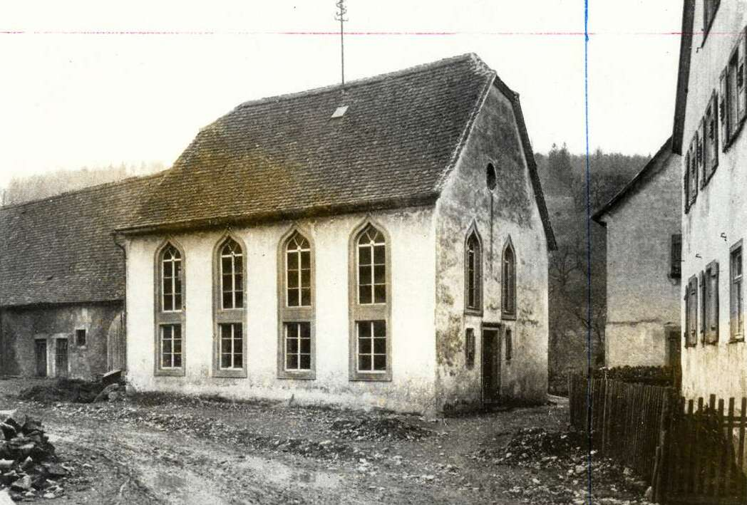 Synagoge Archshofen (Creglingen) Nutzungsbedingungen ausdrücklich auch für Wikipedia (